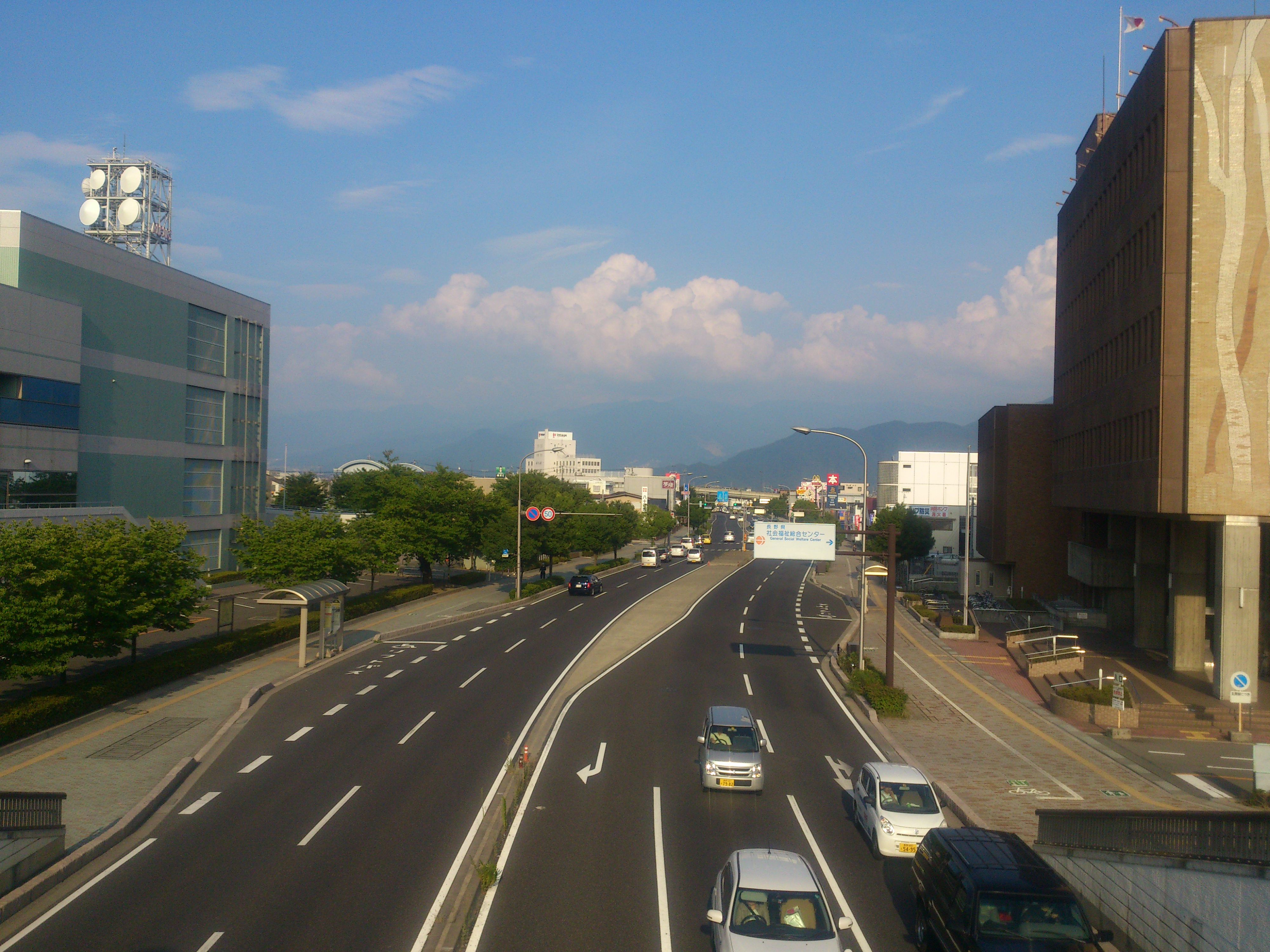 鐘紡通り（日赤通り）・若穂方面（長野県長野市若里三丁目）